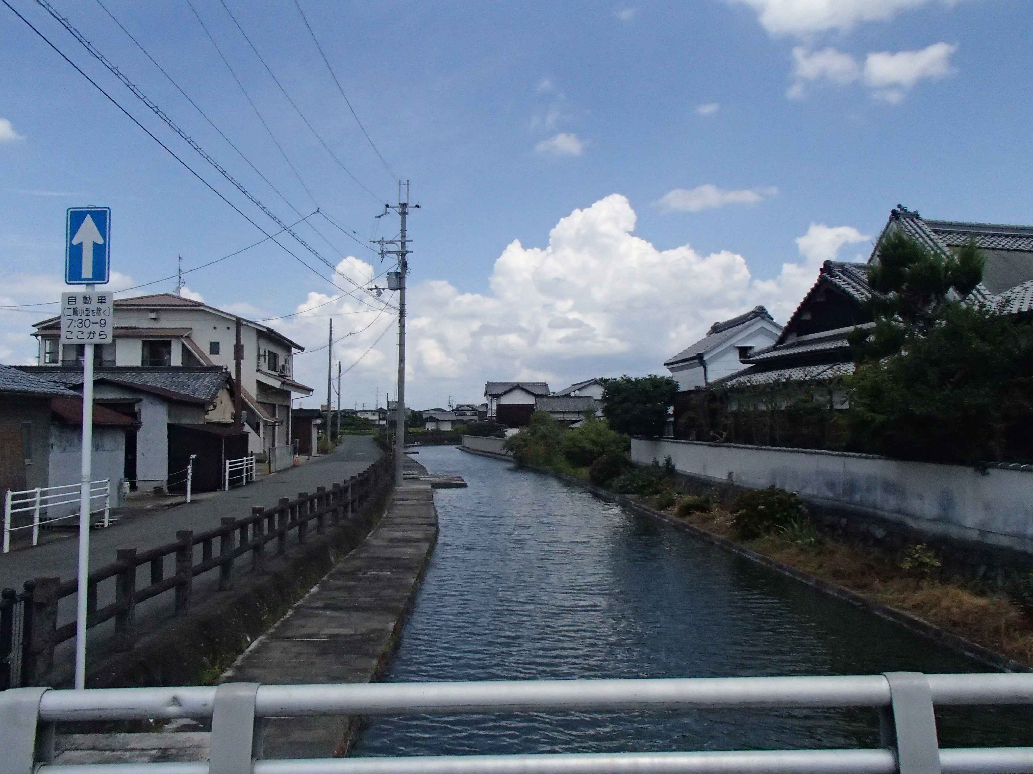 外周の堀